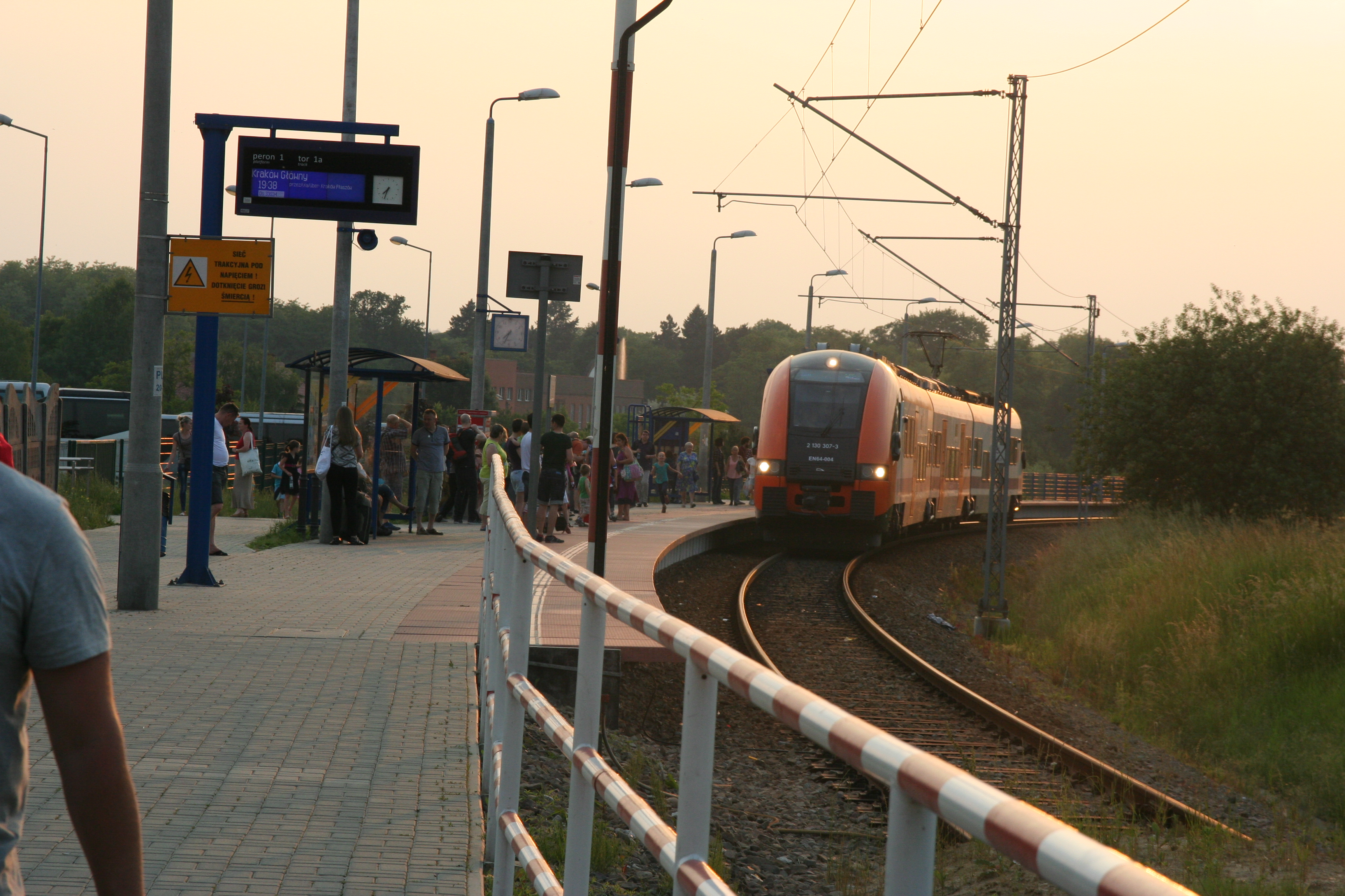 Jeden z weekendowych kursów pociągu Kolei Małopolskich. Wymiana podróżnych kończących podróż z kierunku Krakowa i rozpoczynających podróż w kierunku Krakowa.